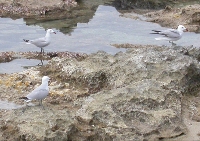 3 Korallenmöwen (Ichthyaetus audouinii), fotografiert bei "Punta de ses Portes " auf Ibiza, Spanien